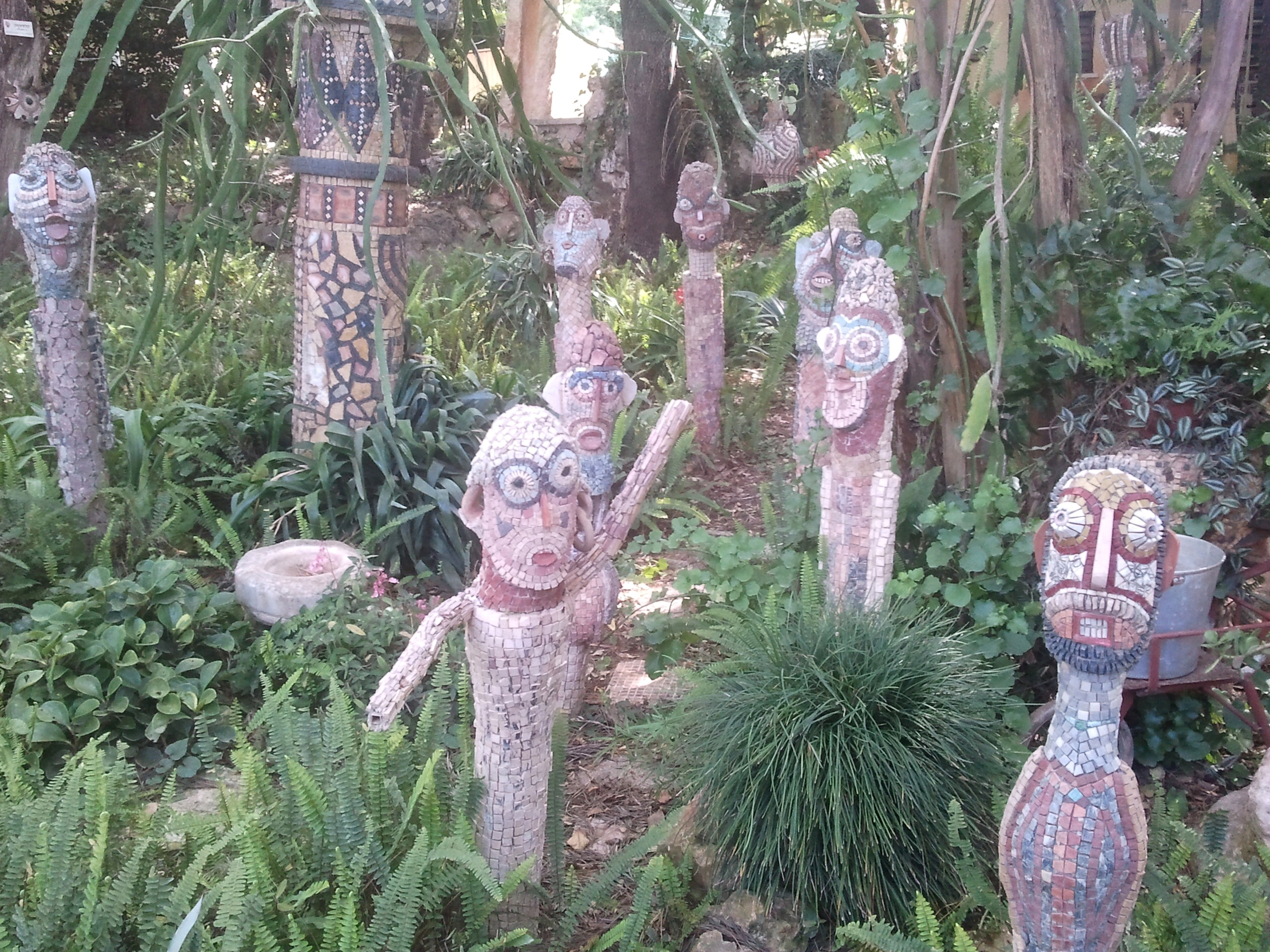 פסל פסיפס - יצירתו של מאיר דודזון מקיבוץ אילון. גן פסלים ליד ביתו שנקרא גן דודזון וגלריה של יצירות בתוך הבית משפחת האדם בדמות פסלי טוטם